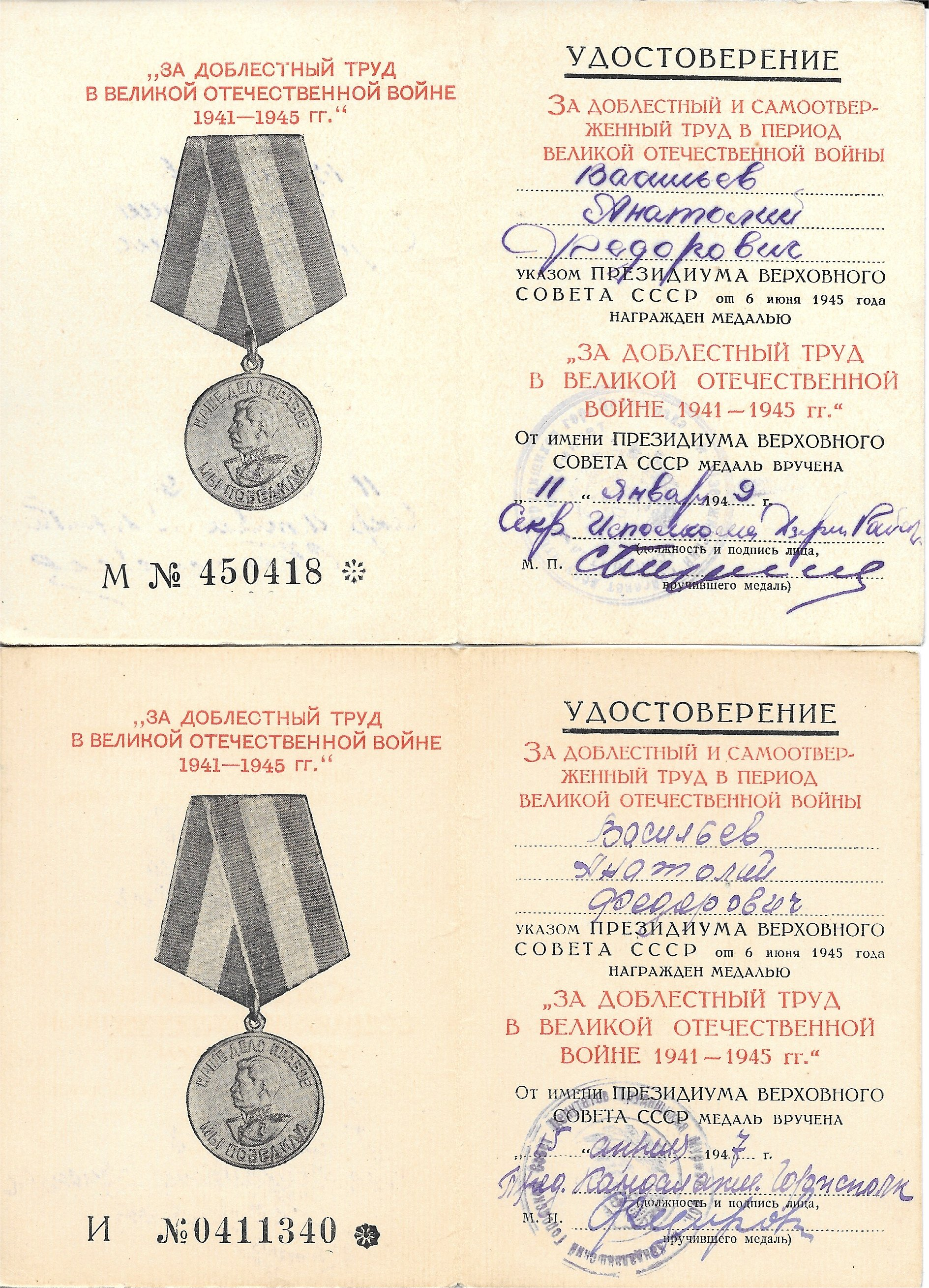 Две медали Васильева А.Ф. "За доблестный труд в Великой Отечественной войне 1941-1945 гг2